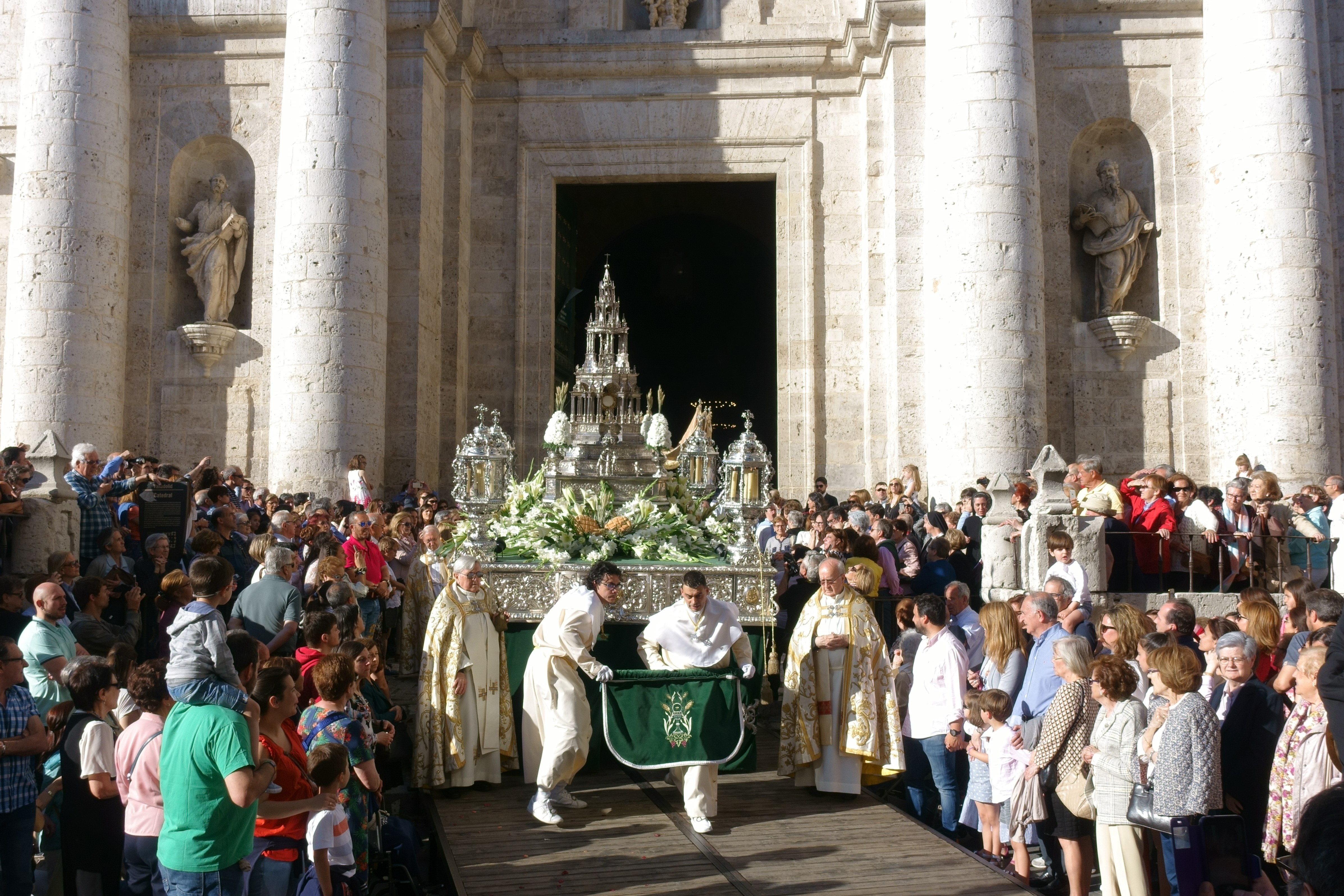 Procesión del Corpus Christi en Valladolid en junio de 2018.